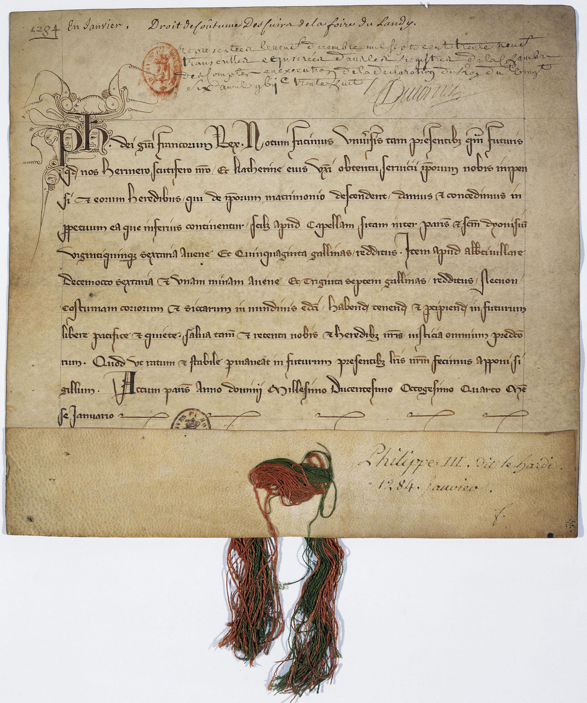 Donation de Philippe III le Hardi à son écuyer Hermier de Montmartre et à son épouse Catherine, en janvier 1285.